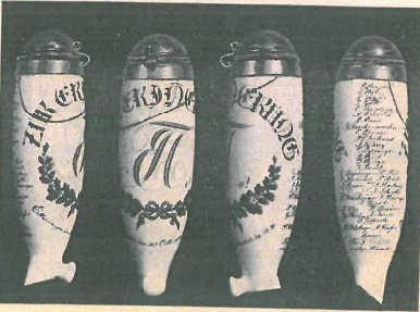 Bundeskopf der Elvacia Tübingen (1833-1836) (Pfeienkopf mit Zirkel und allen Namen der MItglieder)